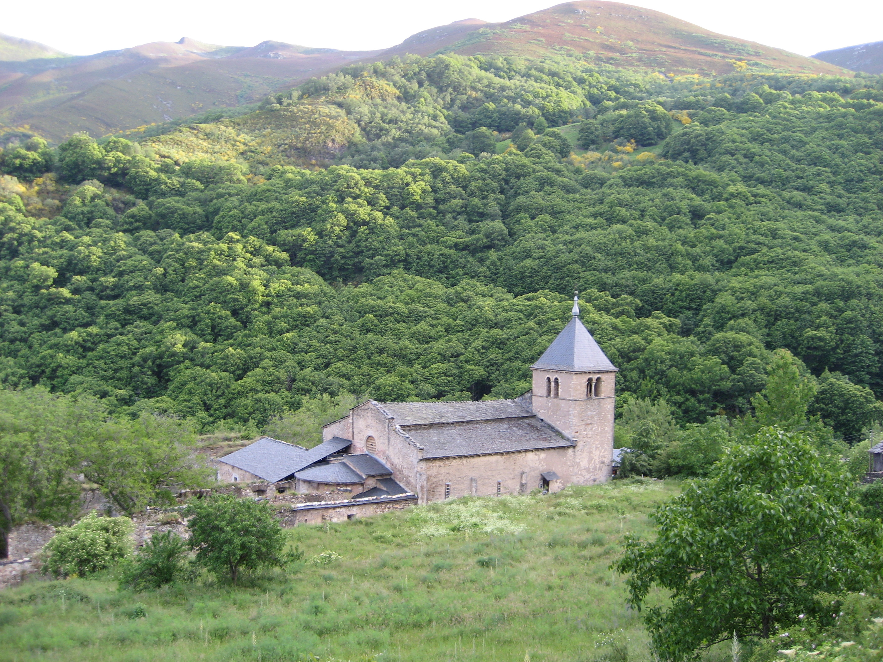 Iglesia Monasterio de San Pedro de Montes (El Bierzo, León, España).